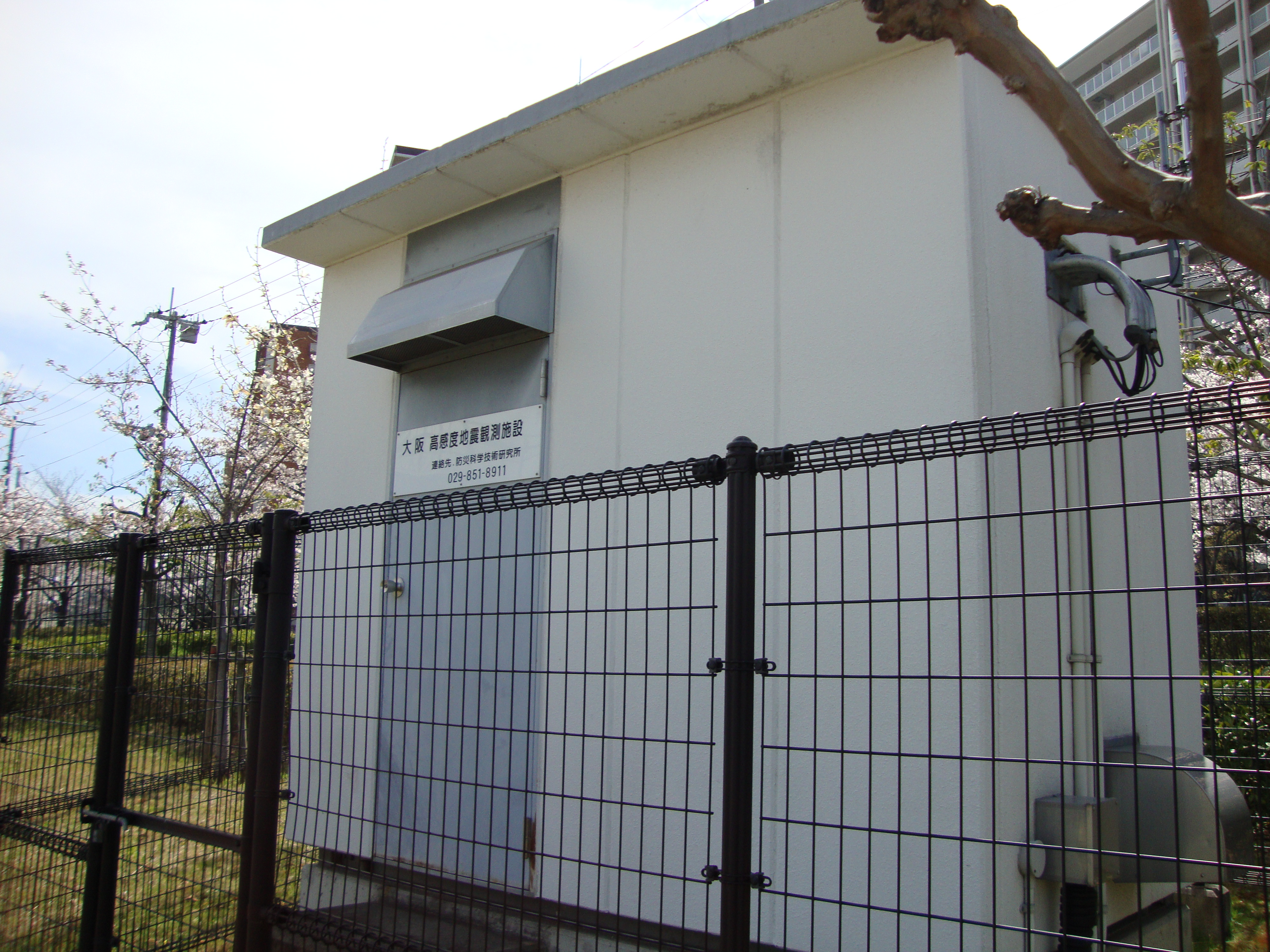 防災科学技術研究所が運用する基盤強震観測網(Kik-net)の大阪にある観測点。ここで観測された地震情報は東海道新幹線の緊急停止用にも使われている。